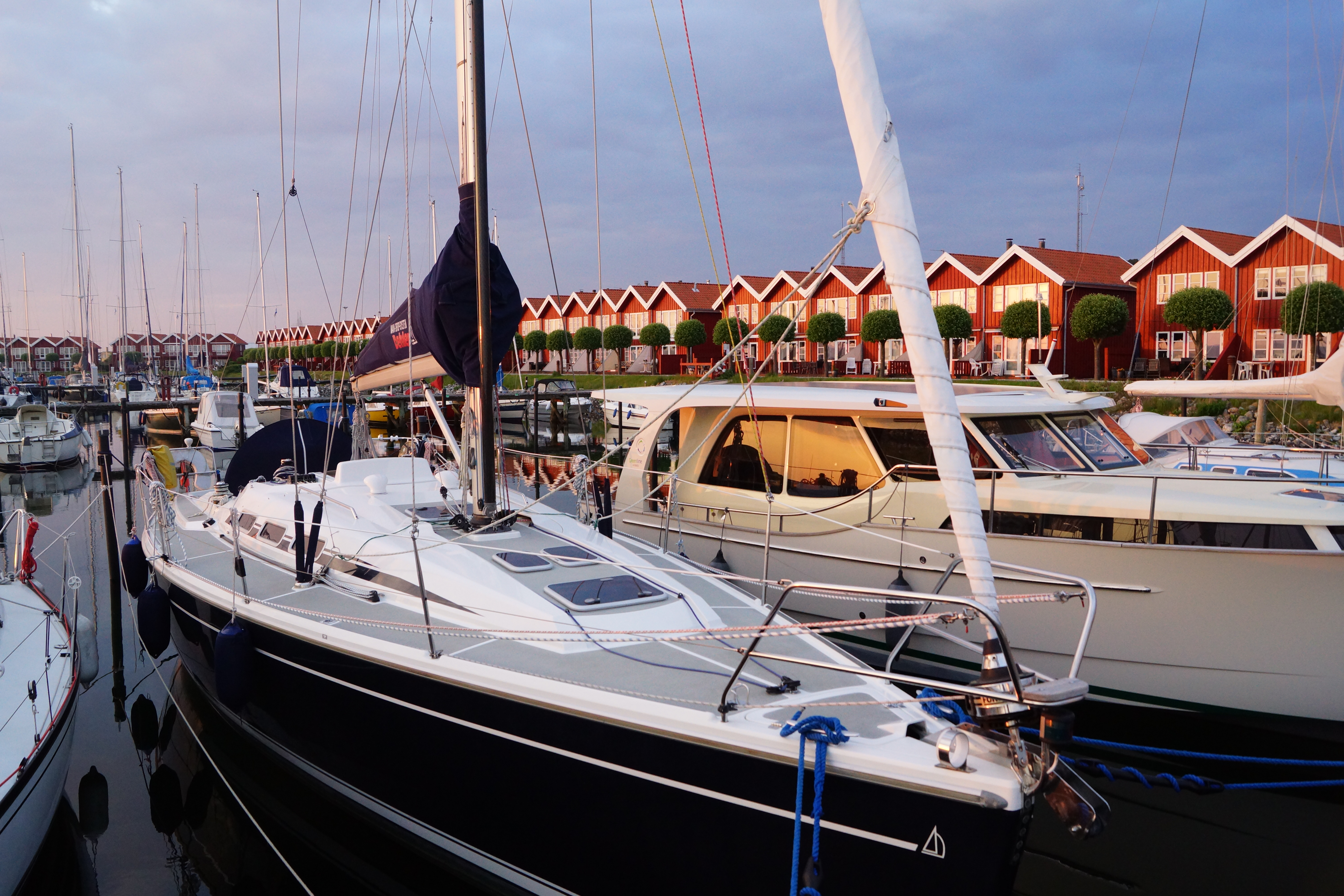 Ebeltoft Marina